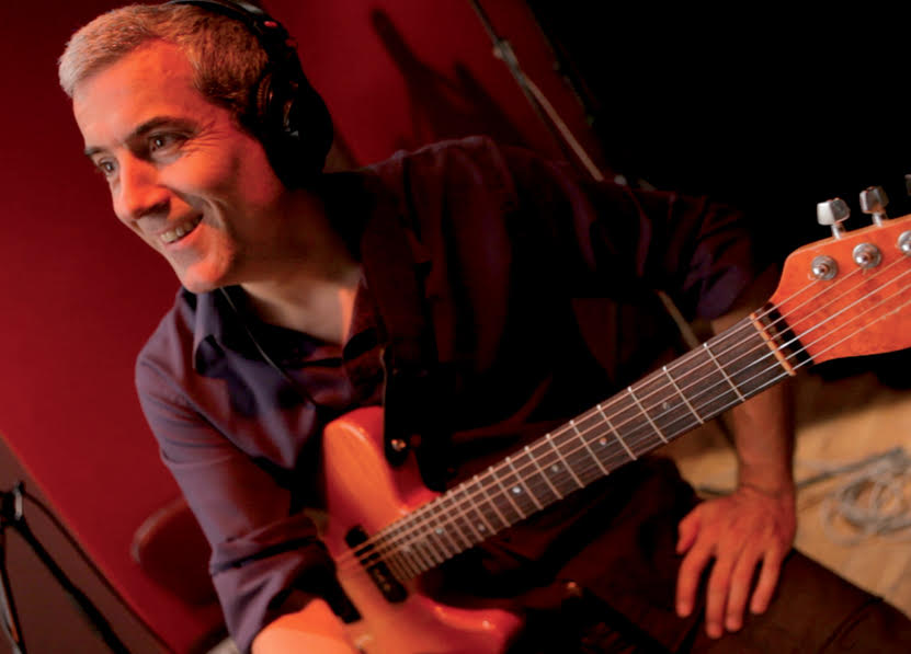 Pierrejean Gaucher par Thomas Cirotteau